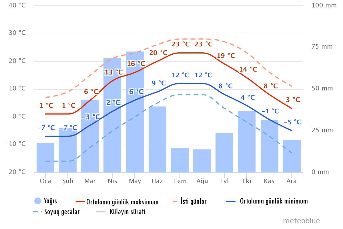 Çeşməli kəndi, İqlim